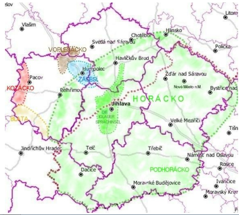 Schematická mapa kraje Vysočina s vymezením známých národopisných oblastí.